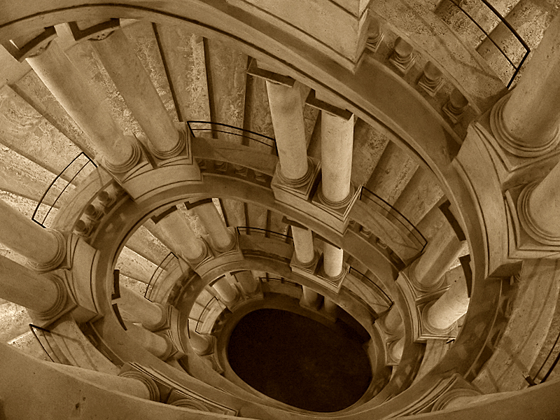 Palazzo Barberini, Rome, Italy. Borromini staircase.